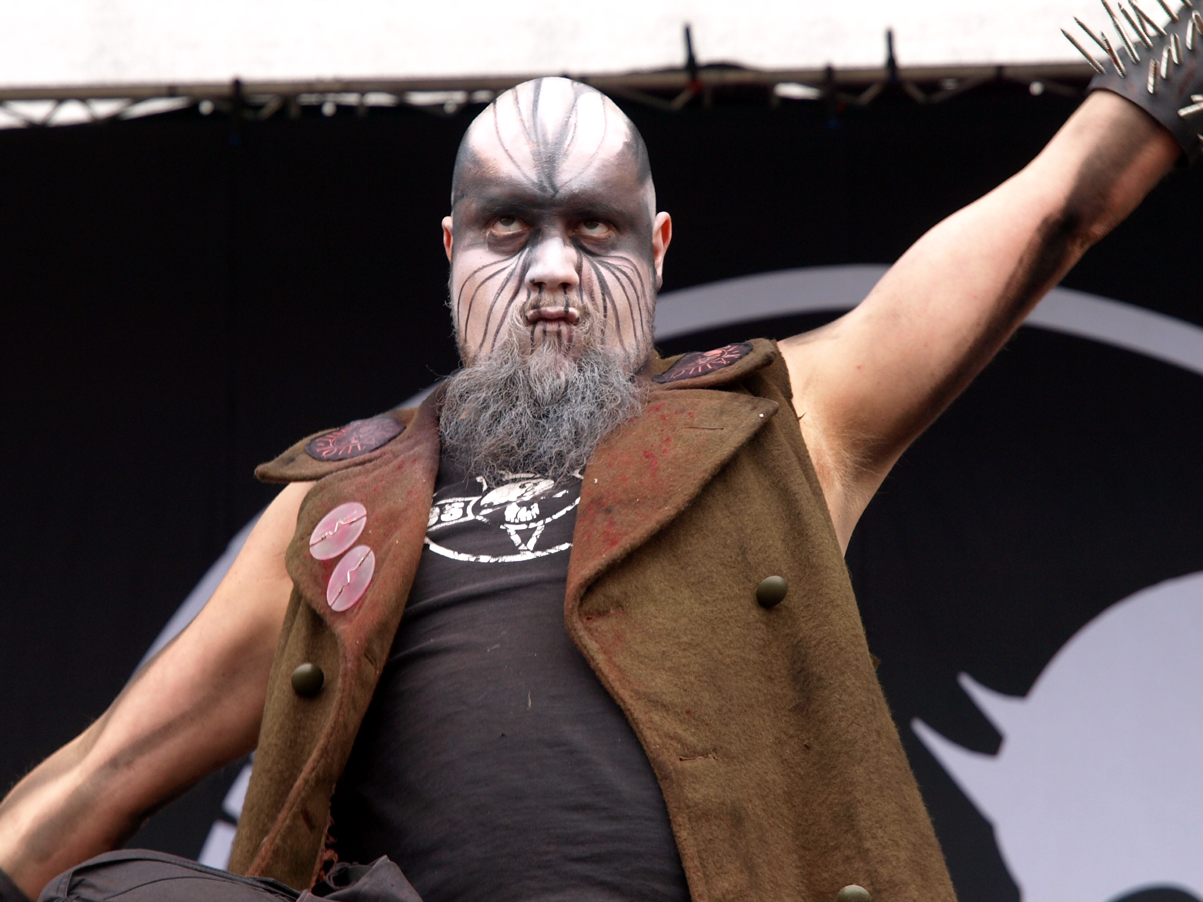 Turmion Kätilöt live am Myötätuulirock 2011